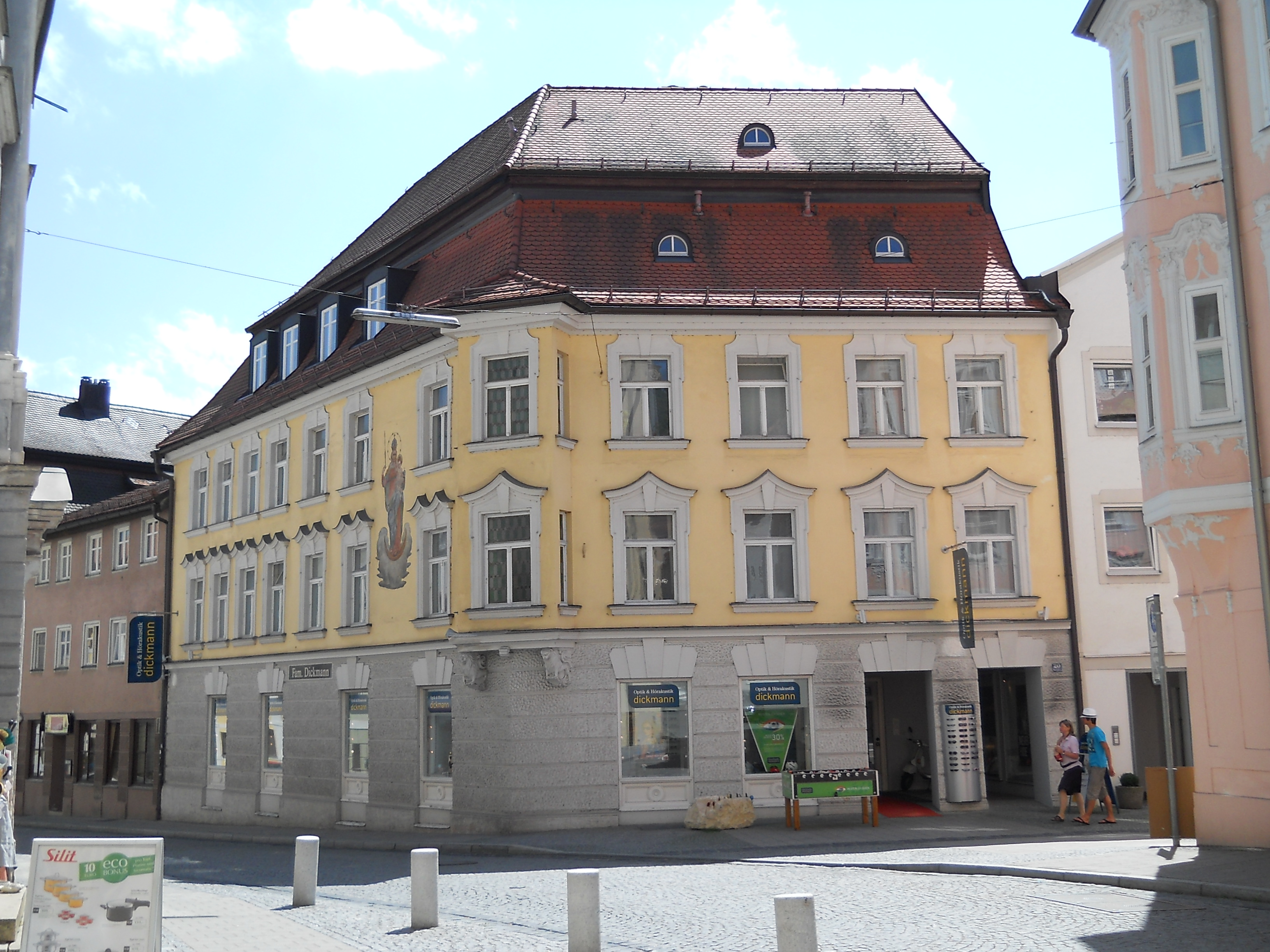 Haus des Barock-Bildhauers Christian Handschuher in Eichstätt (Oberbayern), Marktgasse 20